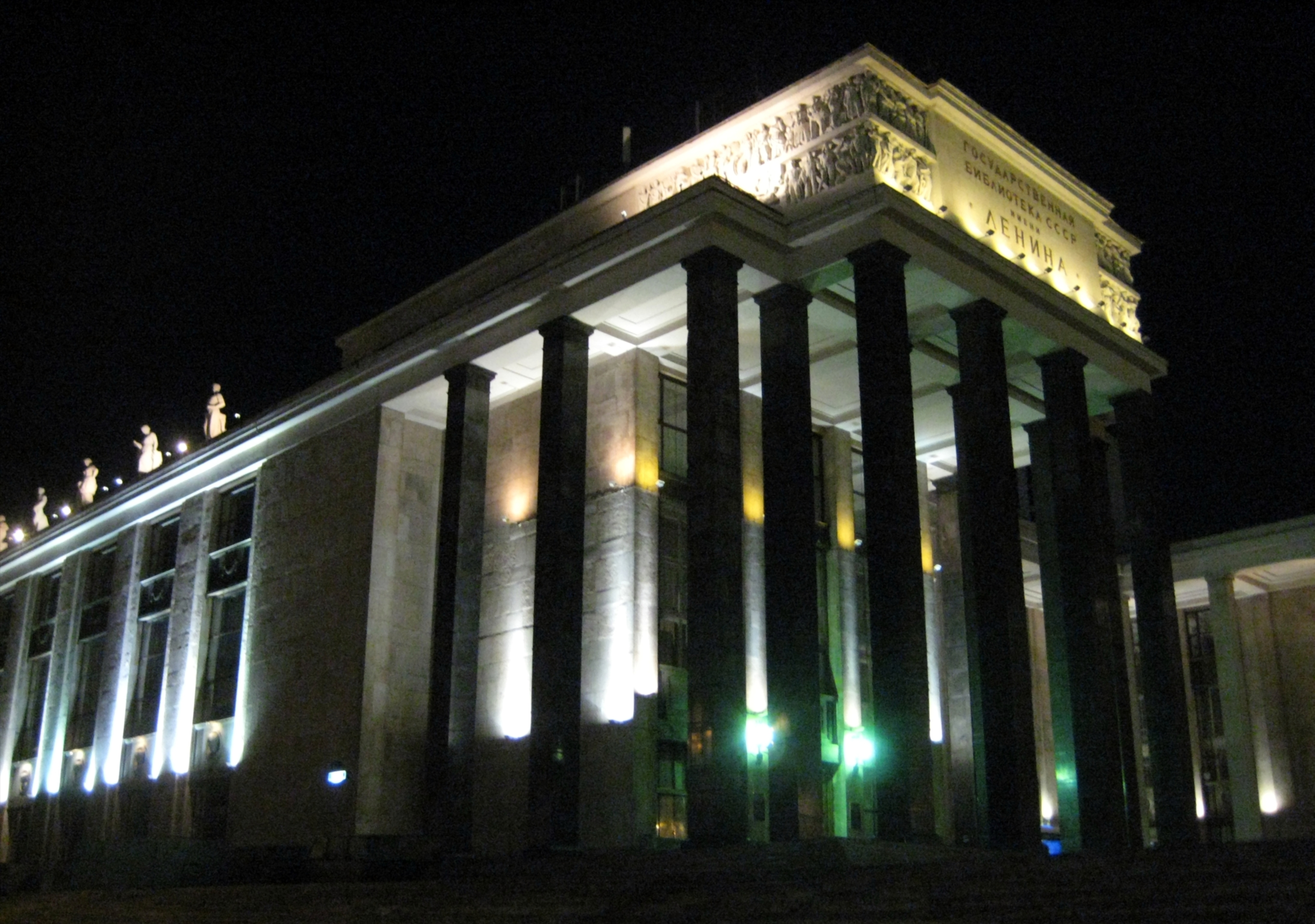 Российская государственная библиотека, ночь